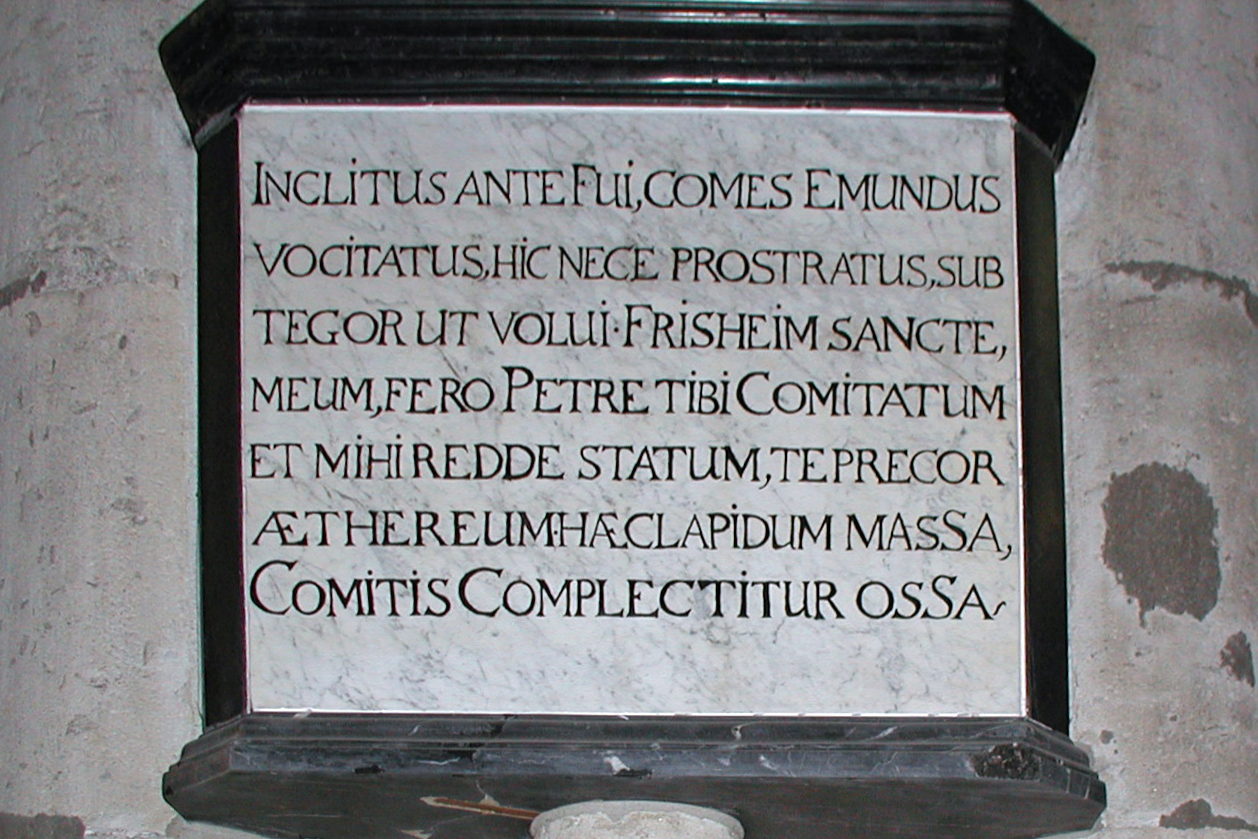 Emundus von Friesheim, Gedenktafel im Kölner Dom. Inclitus ante Fui, Comes Emundus vocitatus, Hic nece prostratus, sub tegor ut volui. Friesheim sancte, meum,fero Petre tibi Comitatum. Et mihi redde statum, te praecor, Aethereum. Haec Lapidum massa, Comitis Complectitur ossa.